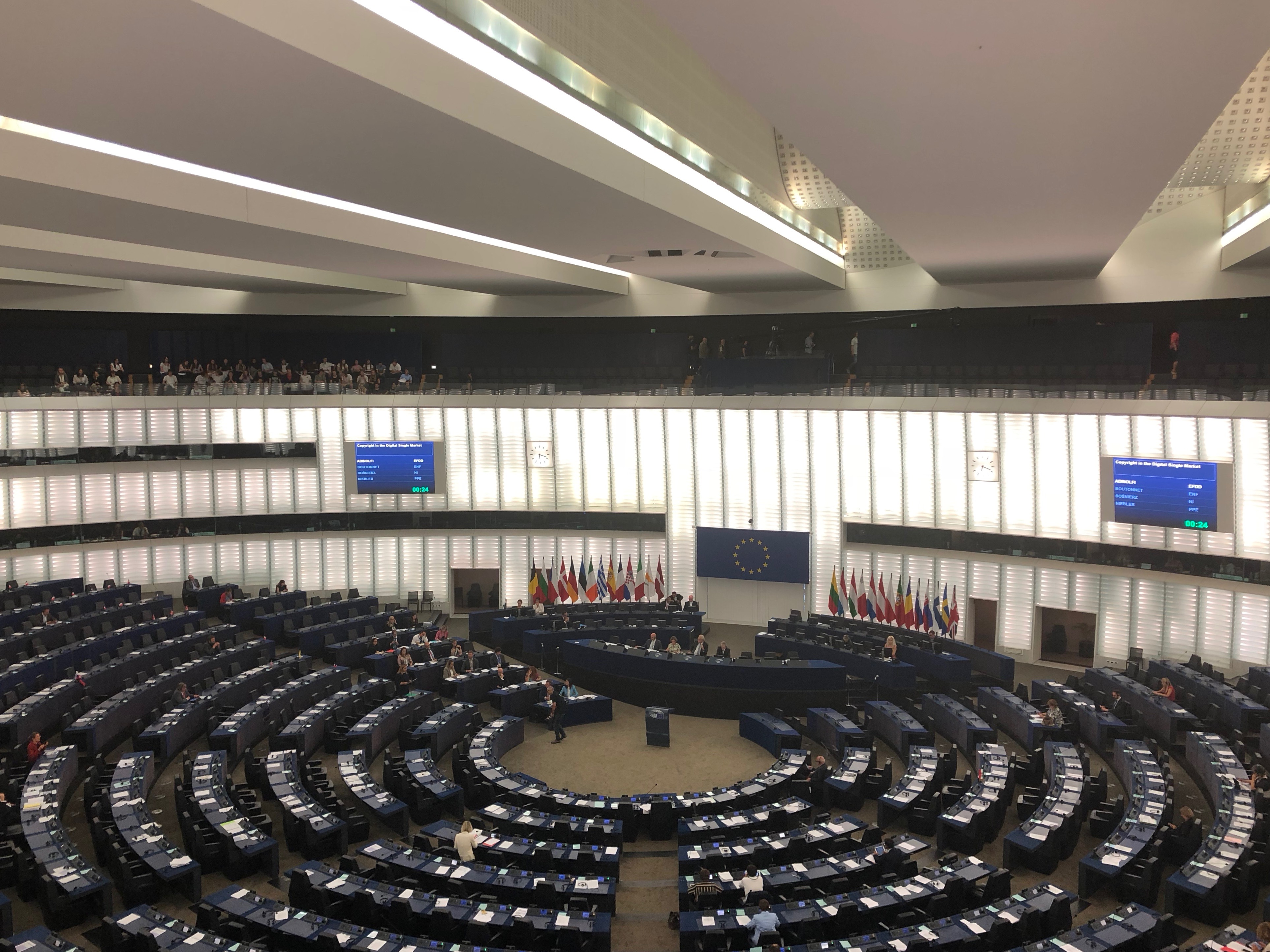 debat in het Europees Parlement in Straatsburg 'Copyright in the digital Single Market'